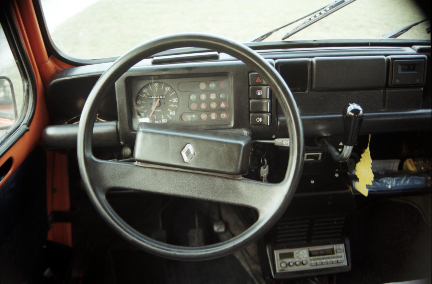 Renault 4 - smrt